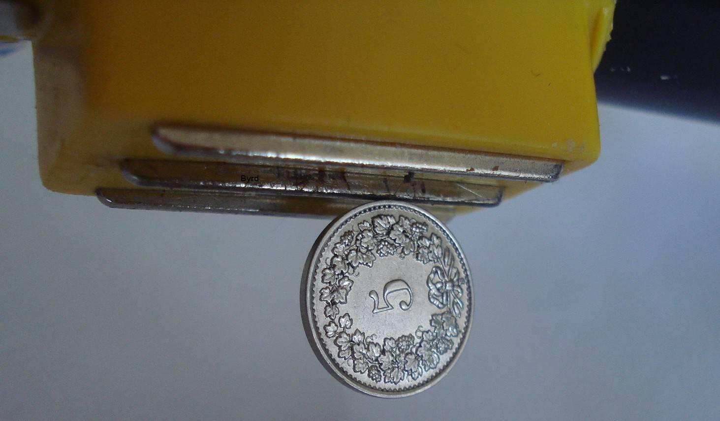 5 Ct en Nickel pur qui est en train de s'aimanter